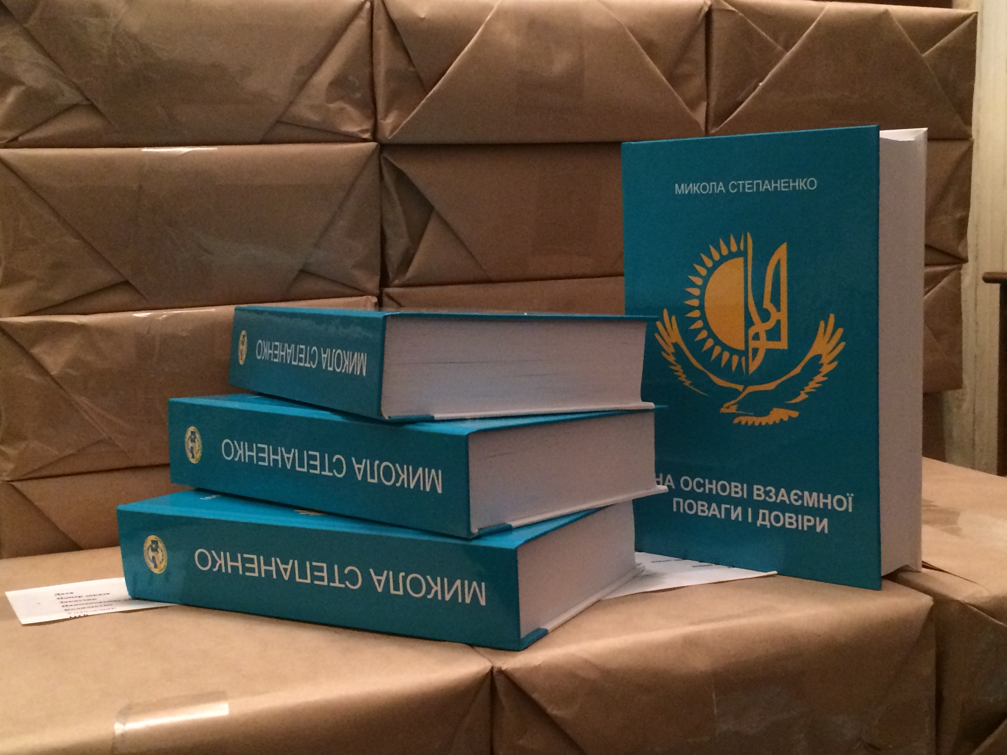 фото обложки